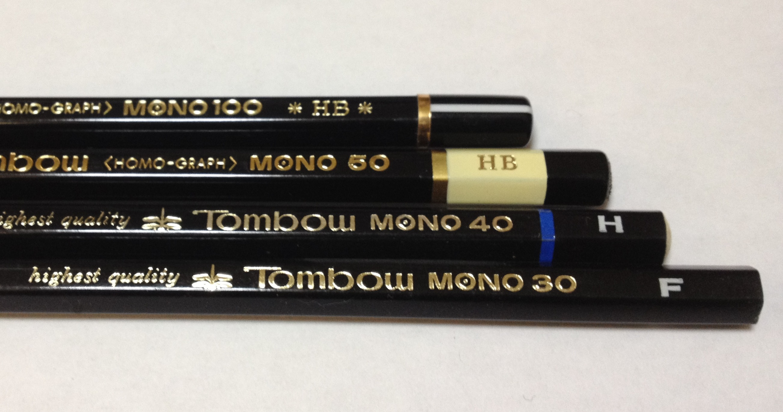 MONO30はMONO-Jに，MONO40はMONO-Rに